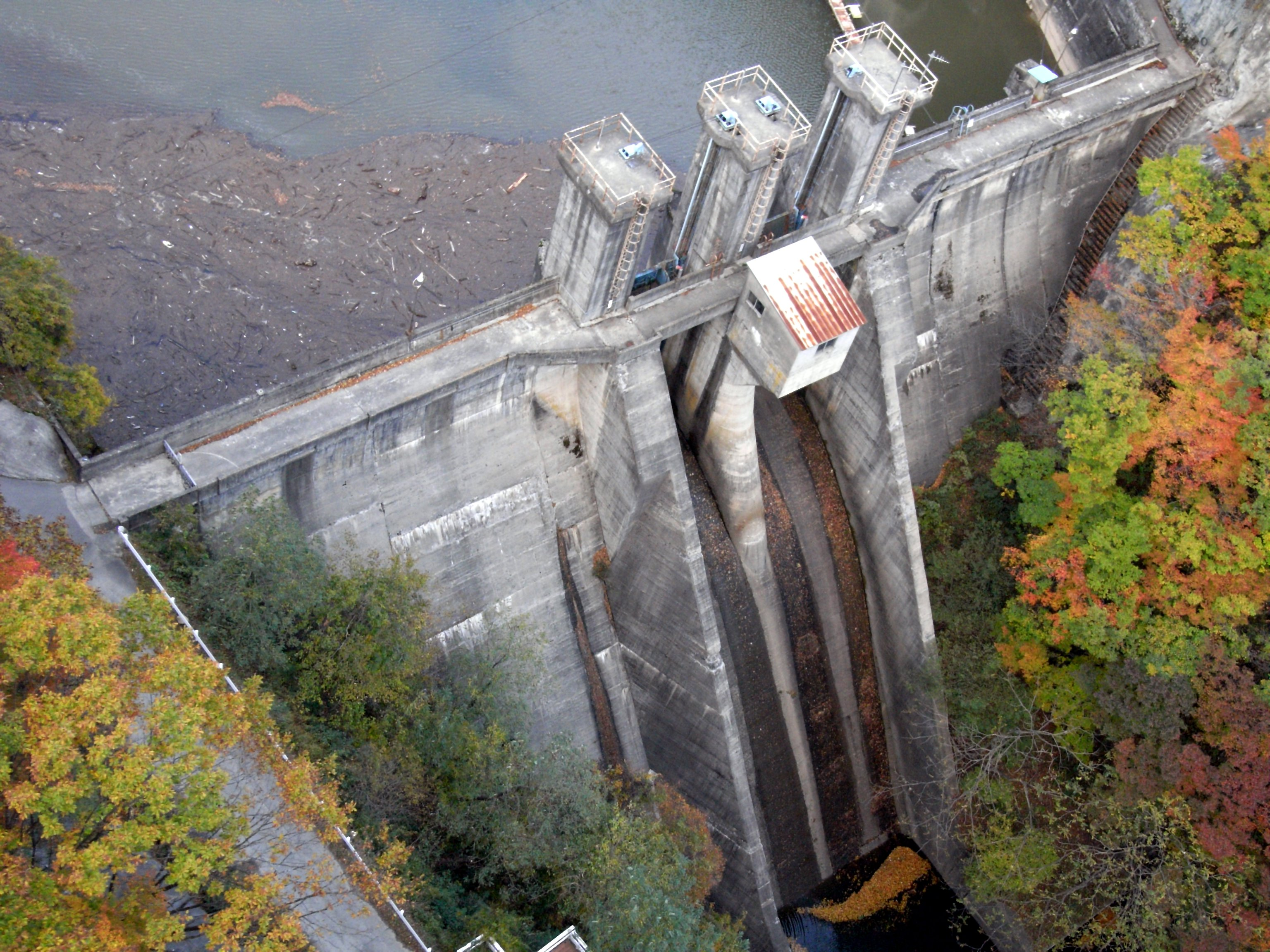 Dam